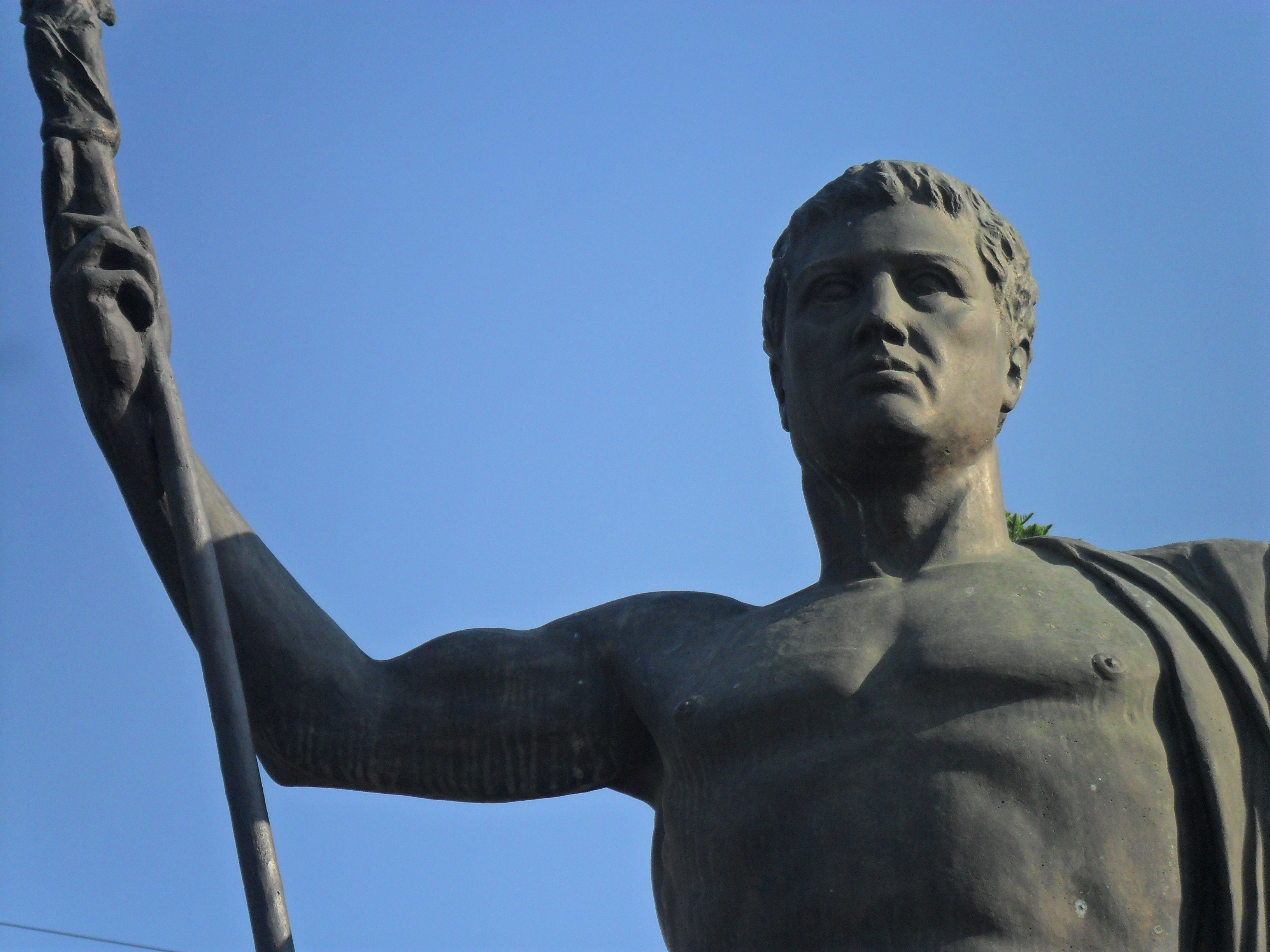 Kale Kapısı mevkiisindeki II. Attalos Heykeli detayı.